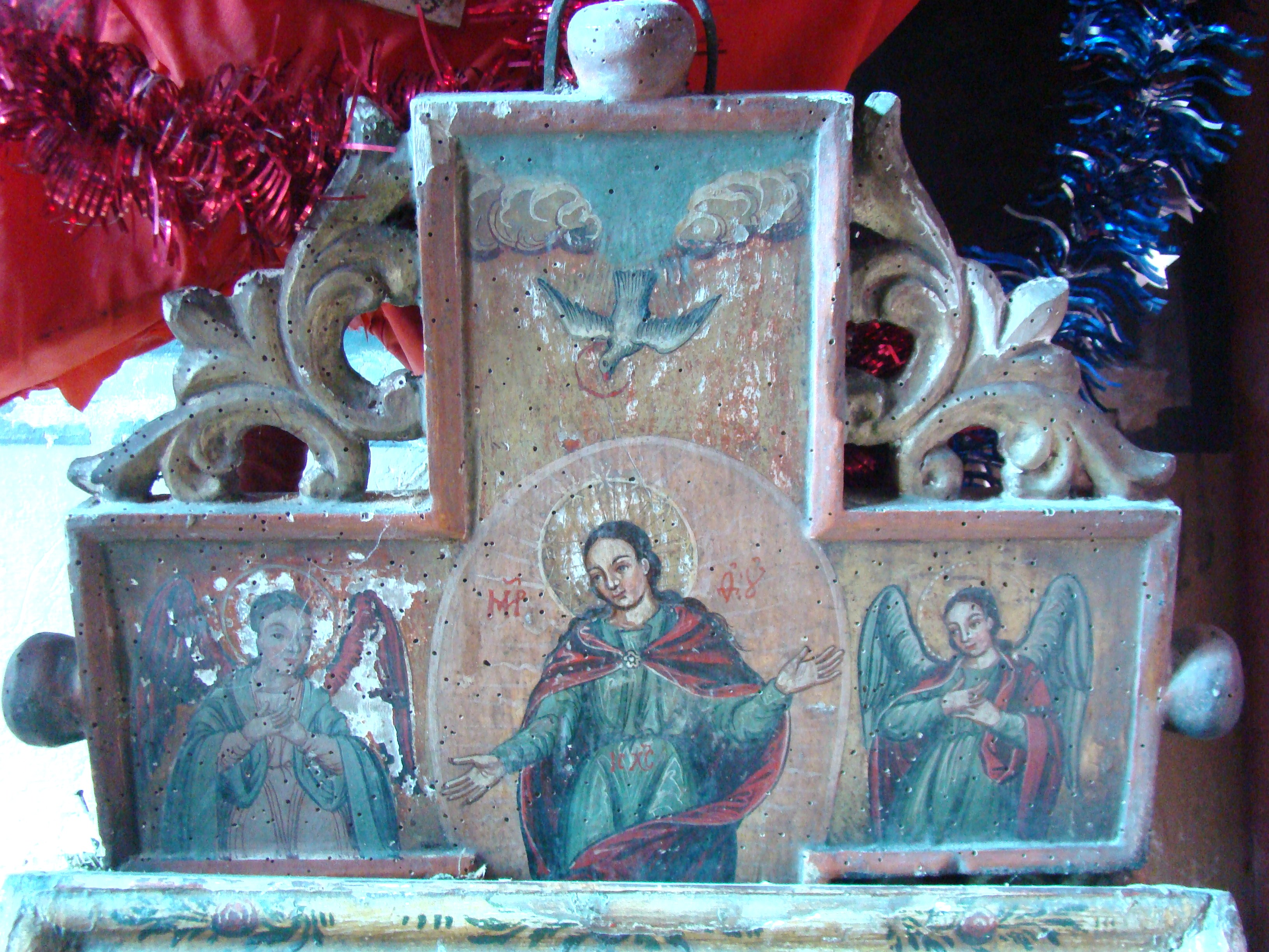 Biserica „Sf. Nicolae", sat DOBROŢ; comuna TOMEŞTI